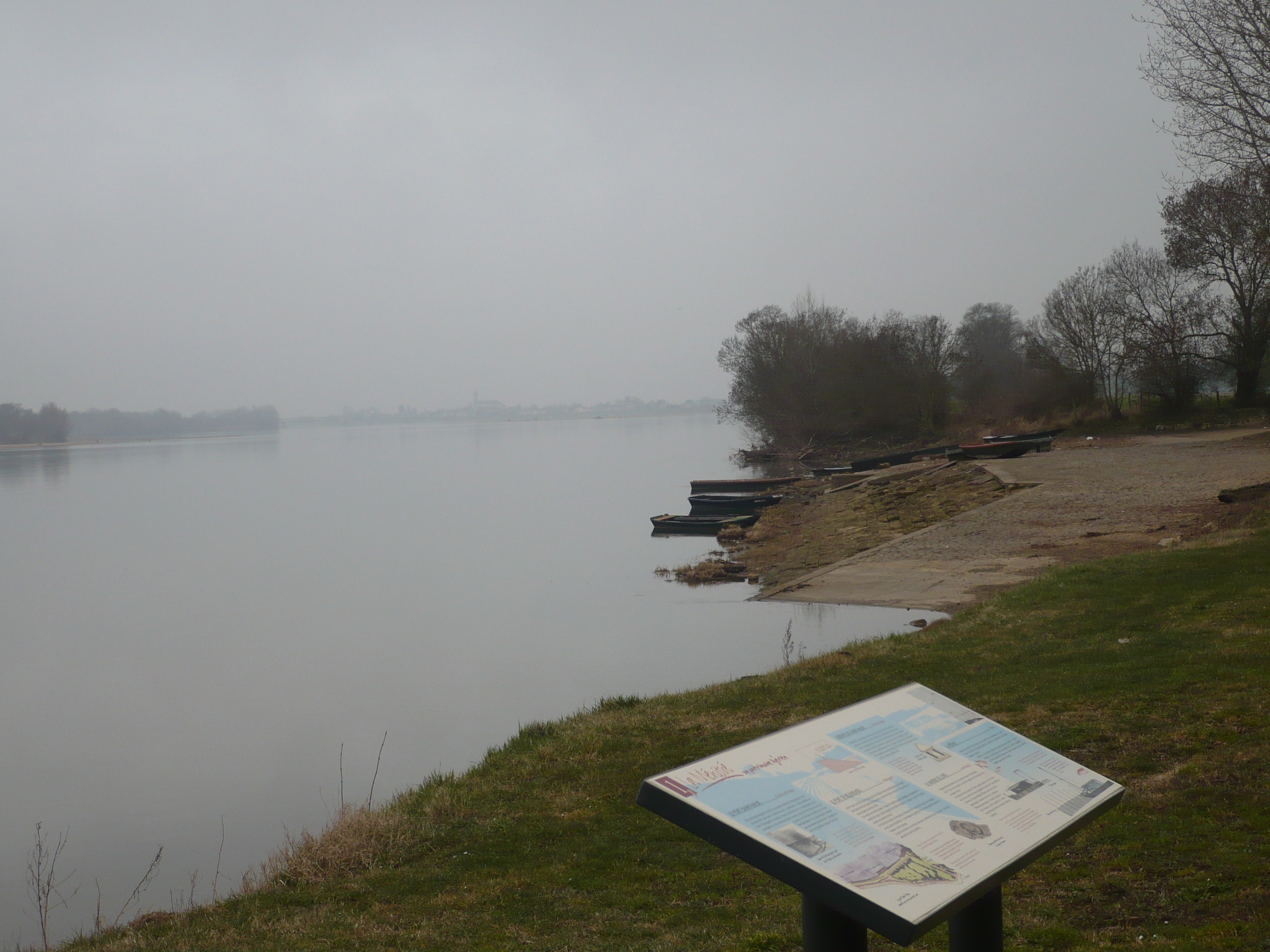 Le port St Maur, en bord de Loire, à la Ménitré.